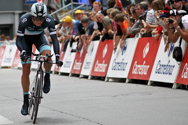 Jakob Fuglsang